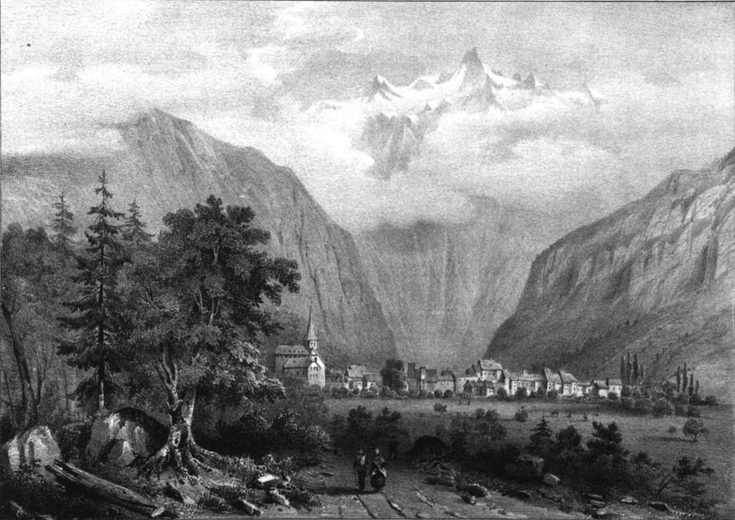 Album du Dauphiné - tome III, litographie, Le Bourg-d'Oisans